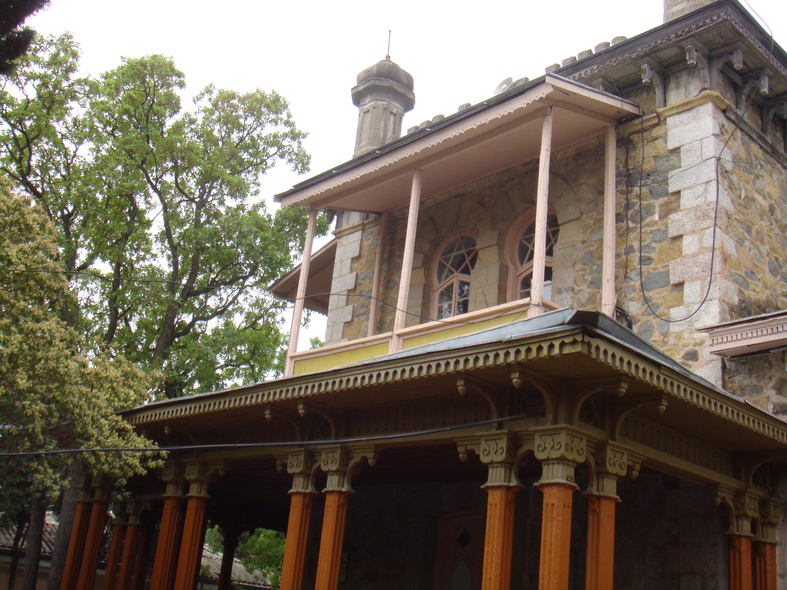 Дача Бекетова, Алушта, вул. Комсомольська, 4